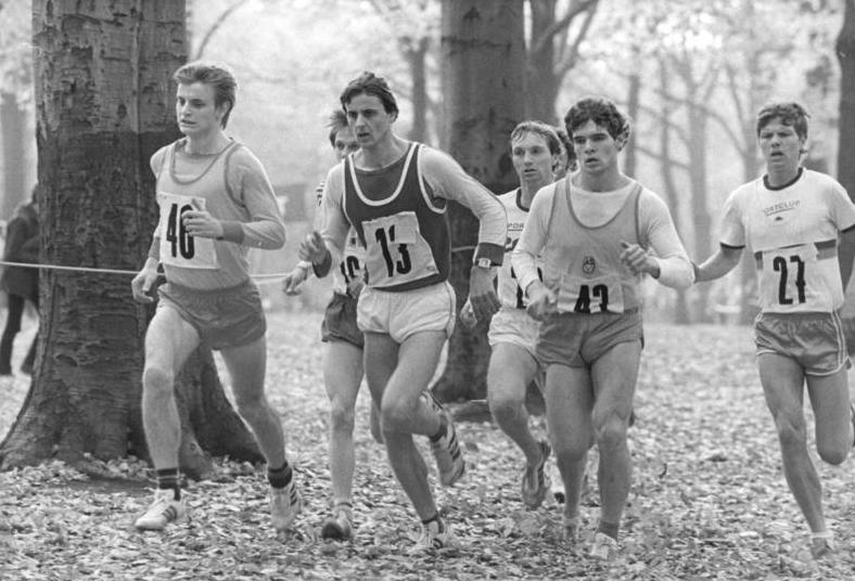 Frank Heine, Rainer Wachenbrunner ADN-ZB Settnik 14.11.82 Berlin: Über 1500 Teilnehmer starteten beim 27. Willi-Sänger-Gedenklauf im Plänterwald. Beim 10 000-m-Gedenklauf der Männer siegte Frank Heine (43) vom ASK Potsdam, der in diesem Jahr DDR-Junioren-Meister über 5000 Meter wurde, vor Rainer Wachenbrunner (13) vom SC Dynamo Berlin, DDR-Meister 1982 im 3000-m-Hindernislauf.